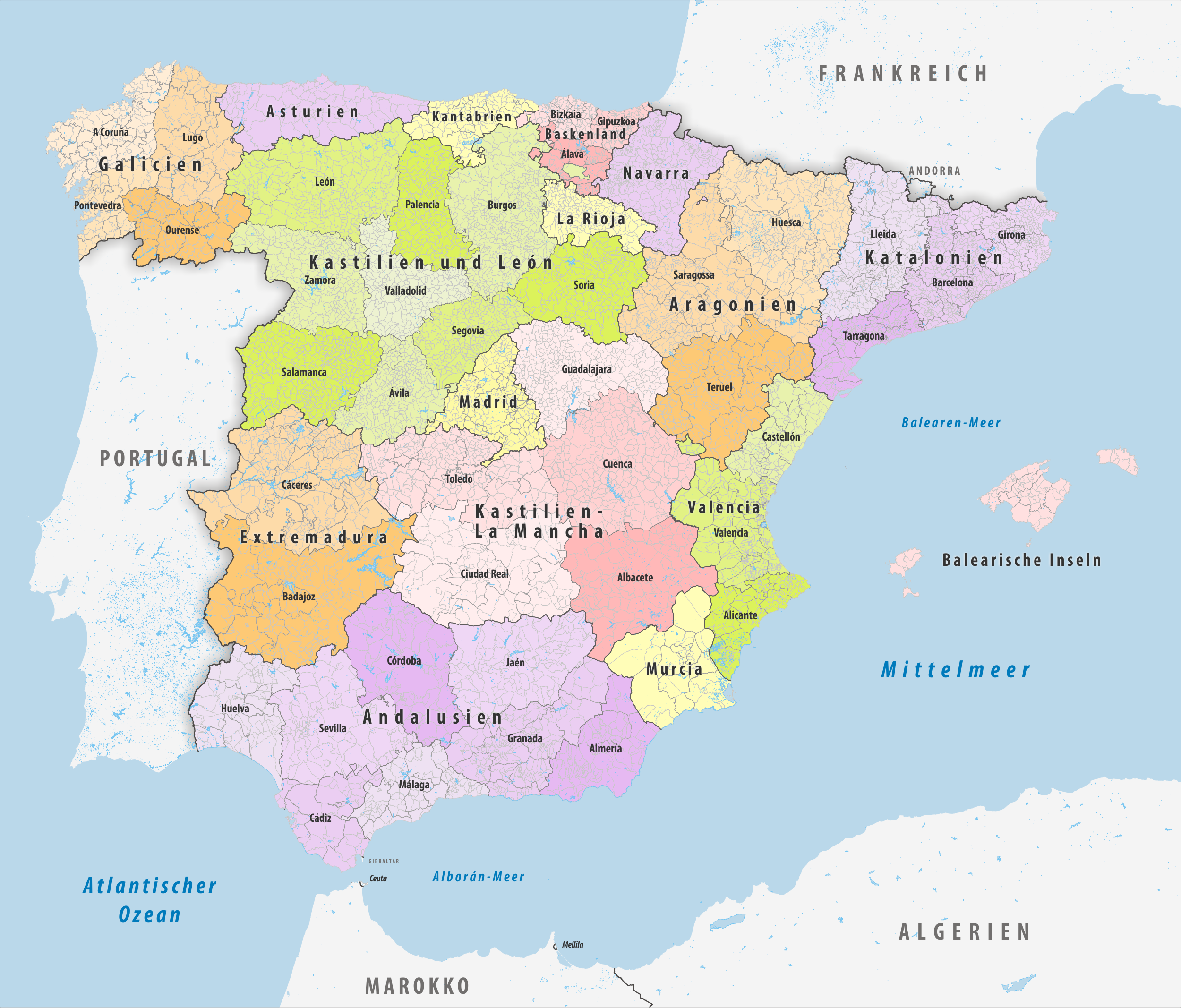 Administrative Gliederung von Spanien